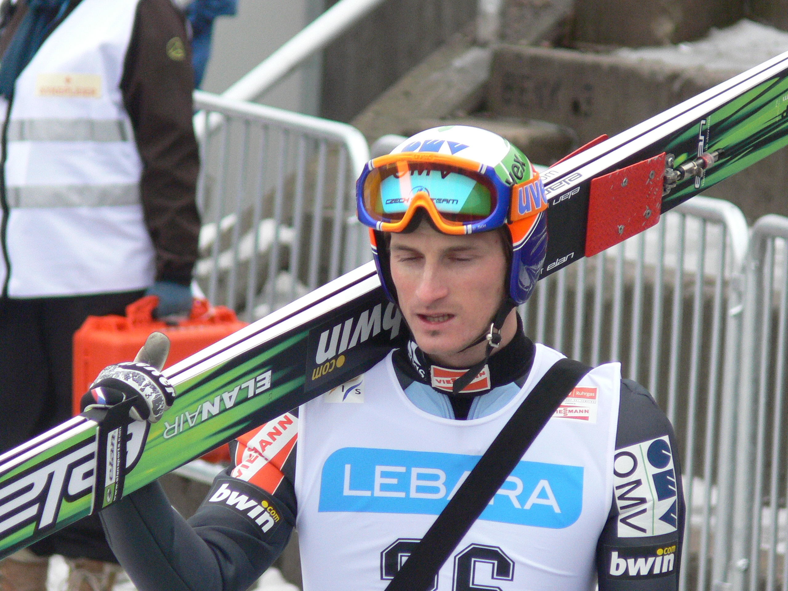 Jakub Janda, from the 2008 World Cup ski jumping event in Holmenkollen, Oslo.